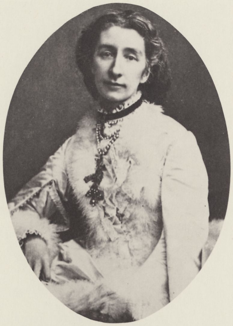 Cosima von Bülow, später zweite Ehefrau Richard Wagners